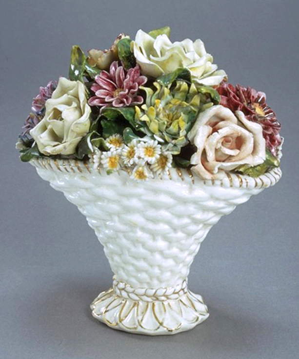 Vaso con fiori. Venezia, Cozzi, seconda metà del XVIII secolo.